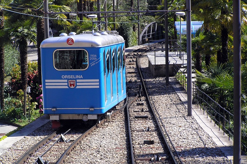 Vettura #2 Orselina funicolare Locarno-Madonna del Sasso (autore Marco Lambruschi)